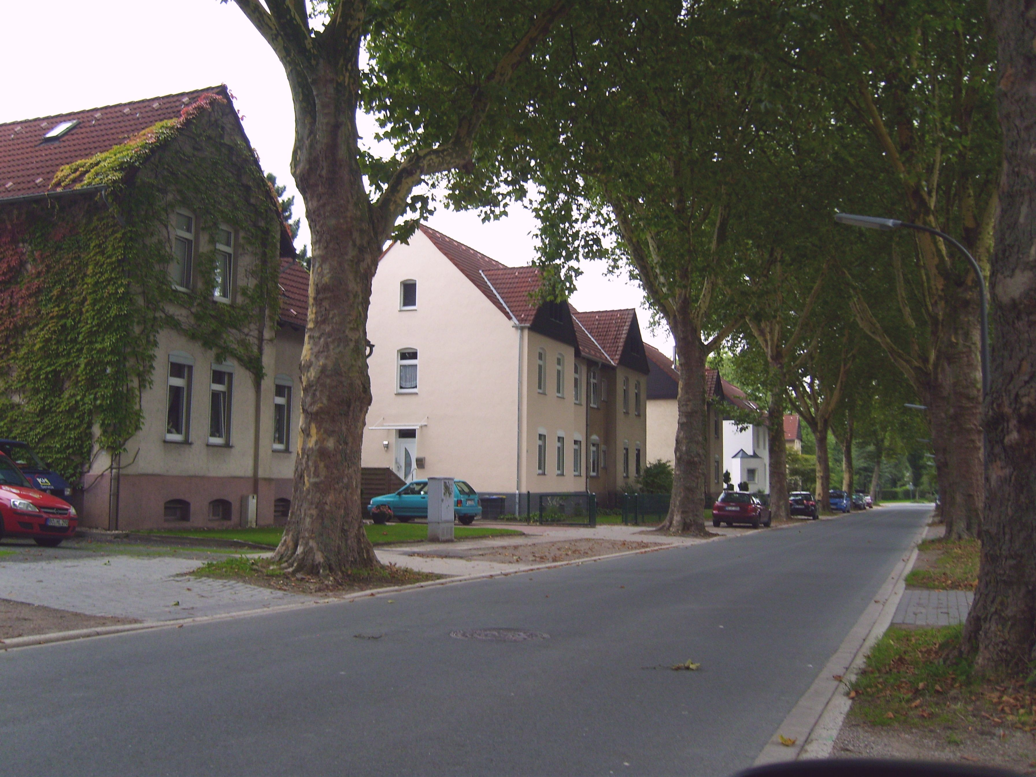 Zechenkolonie an der westlichen Hiberniastraße, Hinsberg im Recklinghäuser Ostviertel, erbaut um 1900